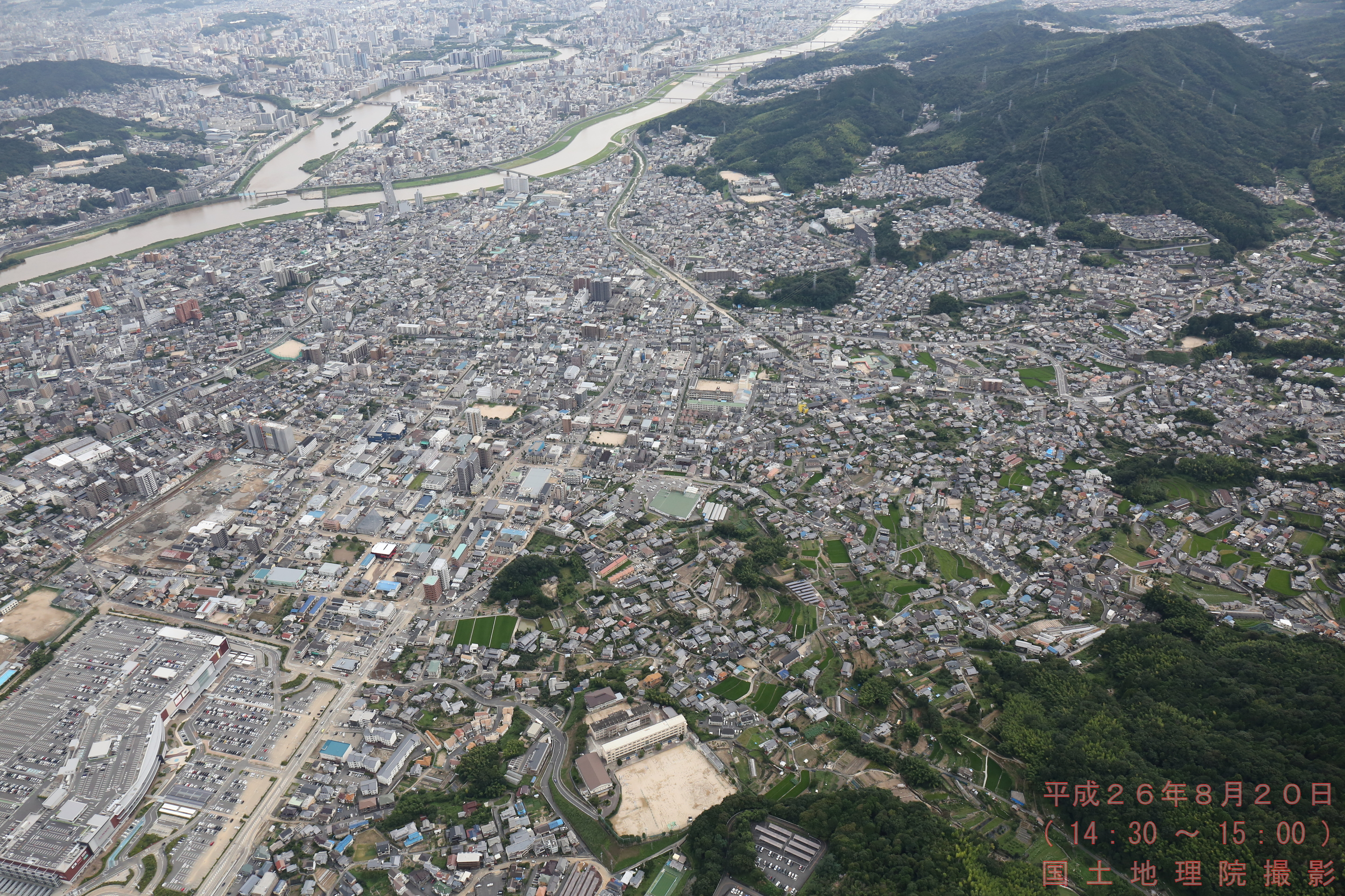 平成26年8月豪雨による広島市の土砂災害